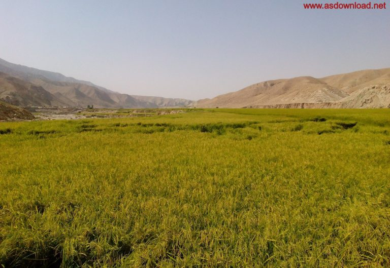 مزارع برنجکاری دره بنیاب و منجوک